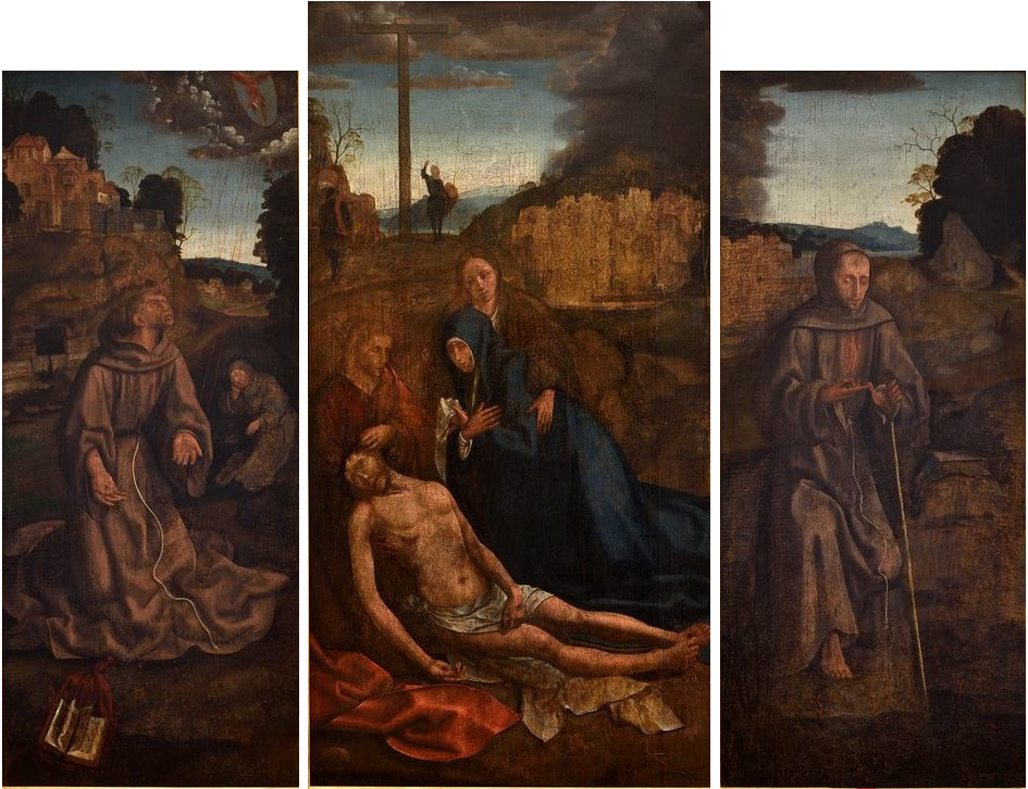 Tríptico de Cook ou da Lamentação pintura de Grao Vasco de cerca de 1500-1525, pertencente ao MNAA em depósito no Museu Grão Vasco